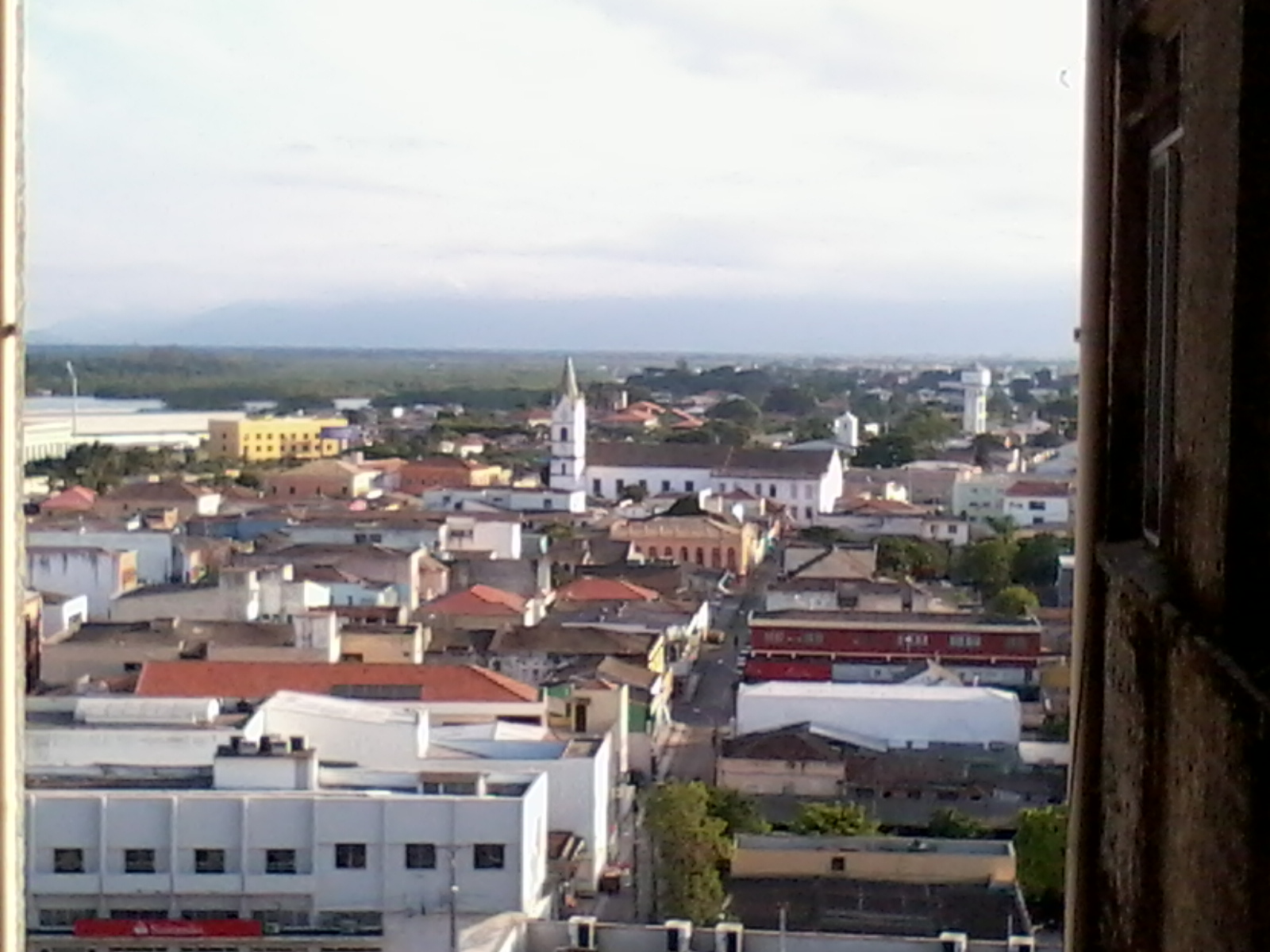 Cidade de Paranaguá vista a partir do Palácio do Café